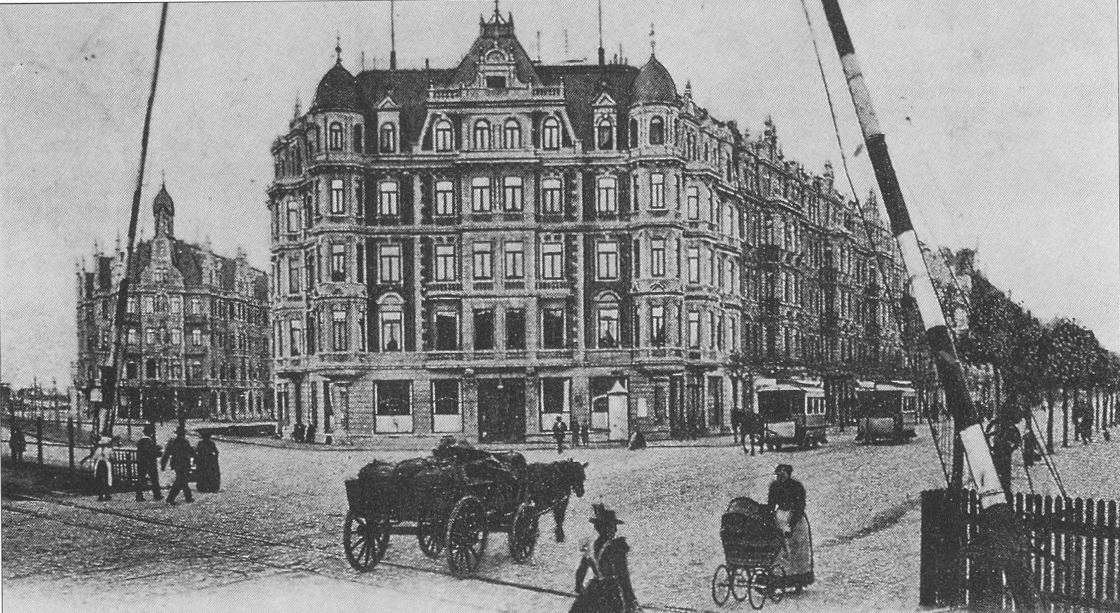 Sog. Leher Tor in der Hafenstraße (Bremerhaven). Links ist noch der alte Zollzaun zu sehen, der 1888 stehengeblieben war und nun als Sicherheitszaun für den Bahnbetrieb diente. Ganz links ist der 1892 gebaute Zollinlandsbahnhof an der Moltkestraße zu erkennen.